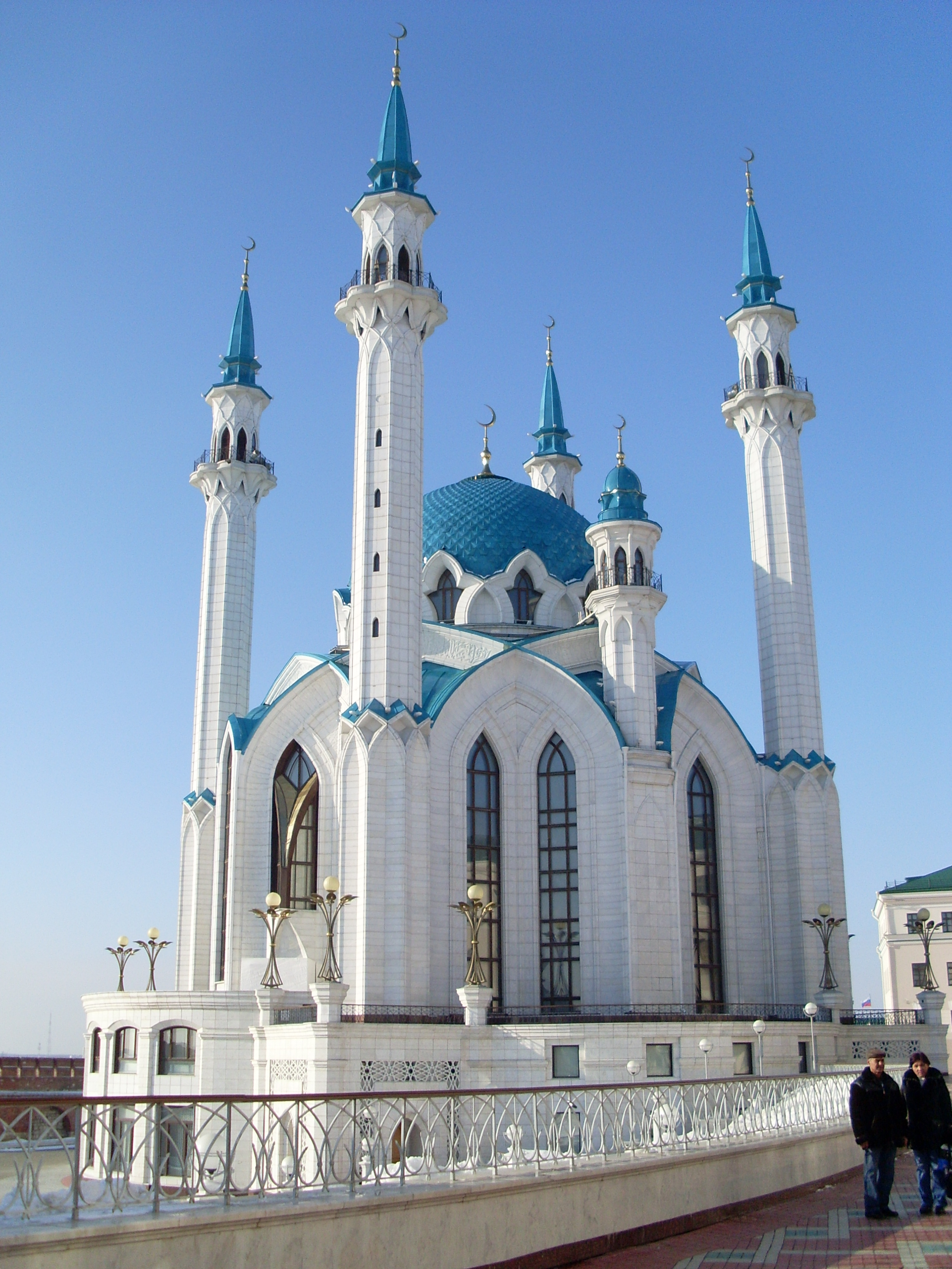 Мечеть Кул Шариф